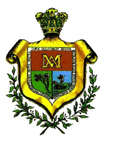 Escudo de la Congregación de las Hermanitas de los Ancianos Desamparados.